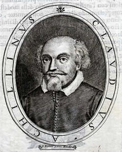 Клавдио Акиллини (1574-1640) — итальянский философ, теолог, математик, поэт, педагог и юрист XVI - XVII века из учёной династии Акиллини.